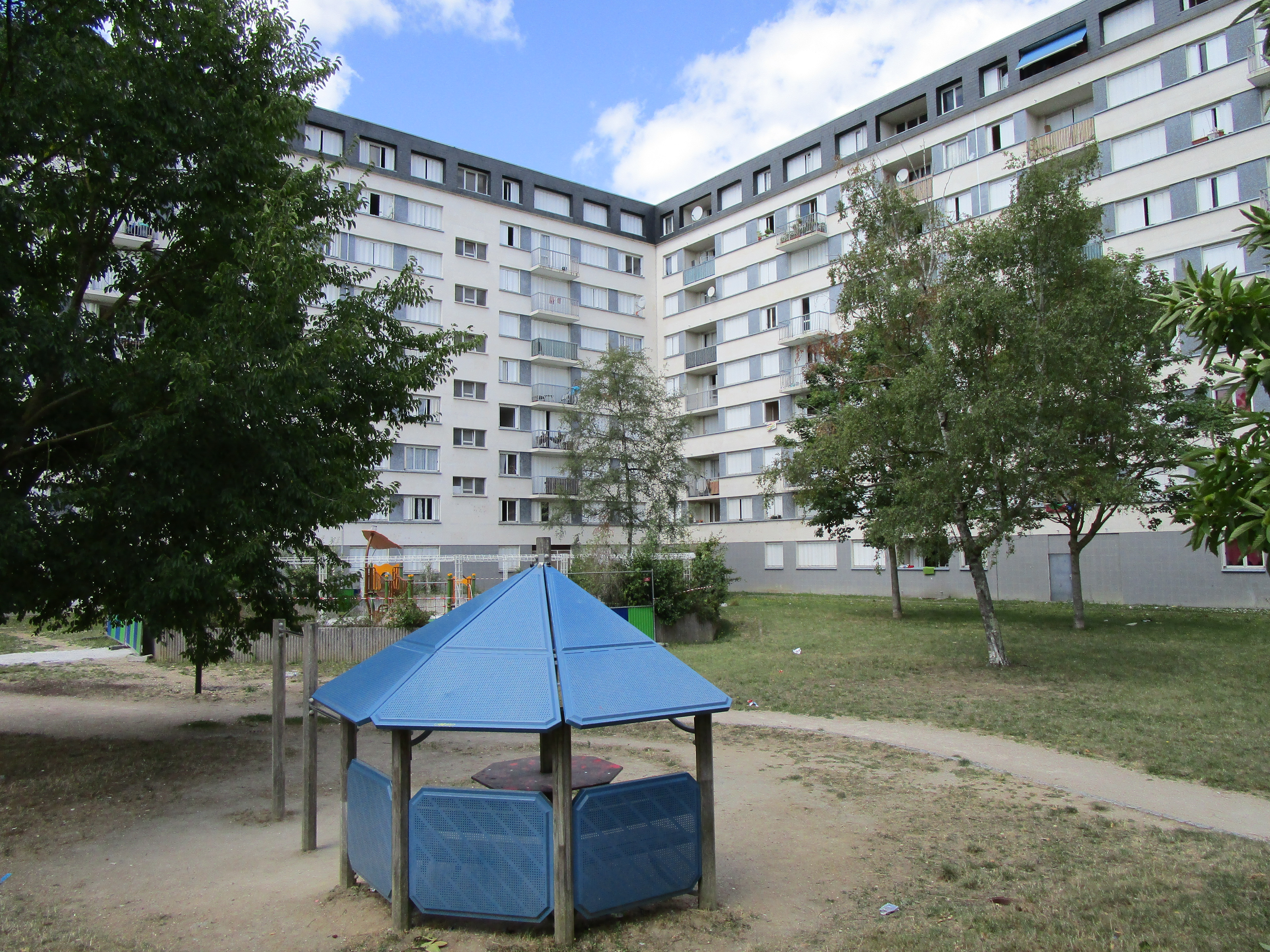 Barres d'immeubles et square Jean-Louis Forain, dans le quartier des Fontaines de Tours.